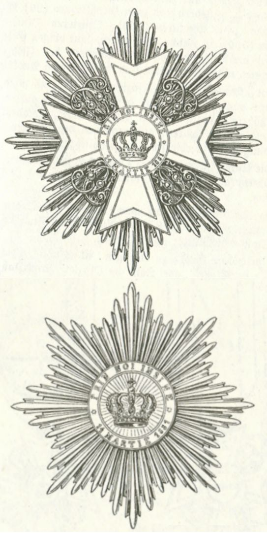 Twee sterren van voor 1932